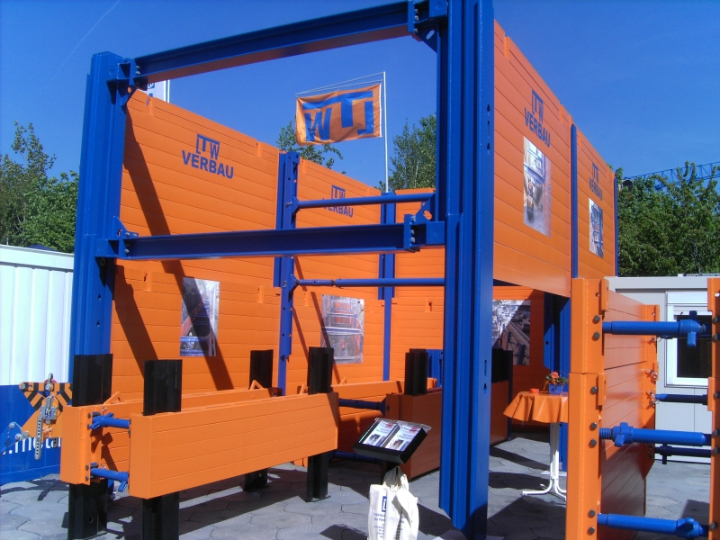 Verbandwandgerät